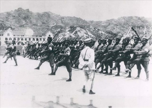 訓練を行う初期の北洋陸軍。